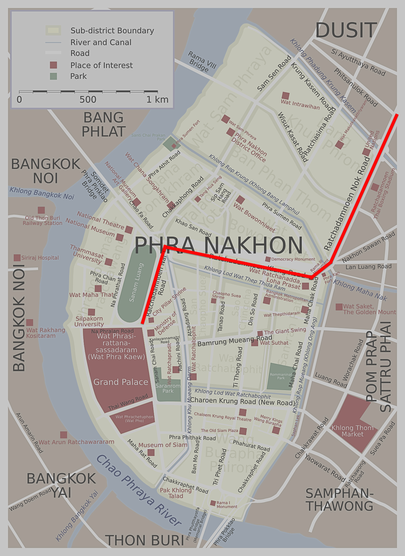 Course of Ratchadamnoen Avenue within Phra Nakhon District, Bangkok